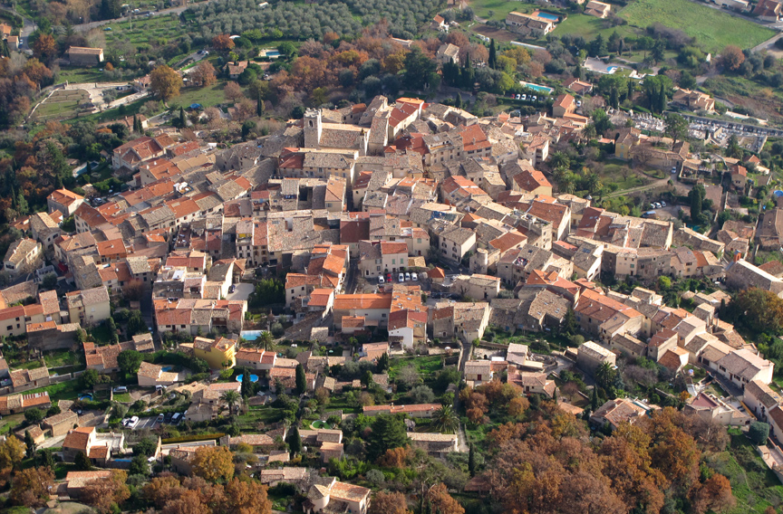 Saint-Jeannet, vue du sommet du Baou de Saint-Jeannet. Alpes-Maritimes, France